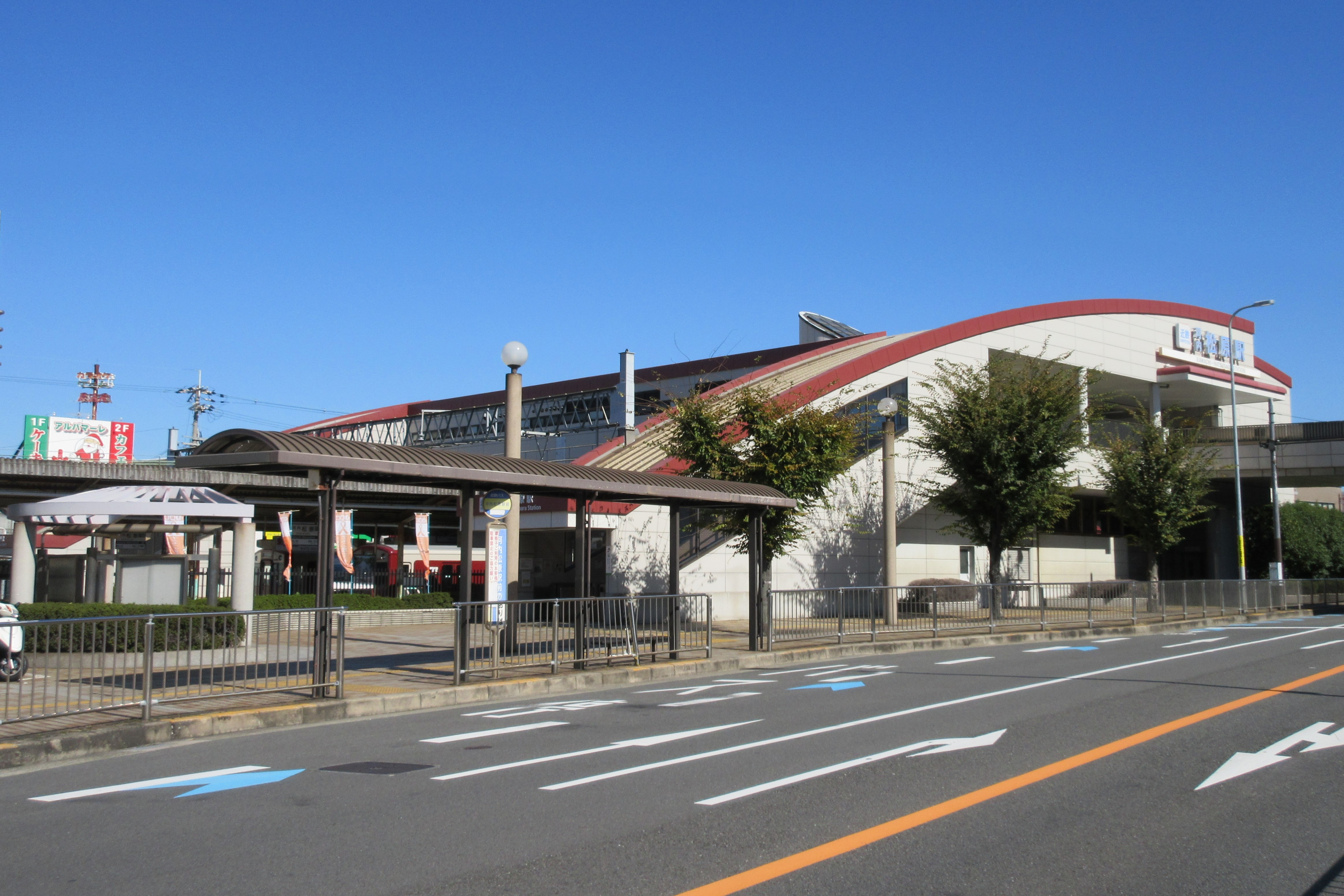 近鉄河内松原駅